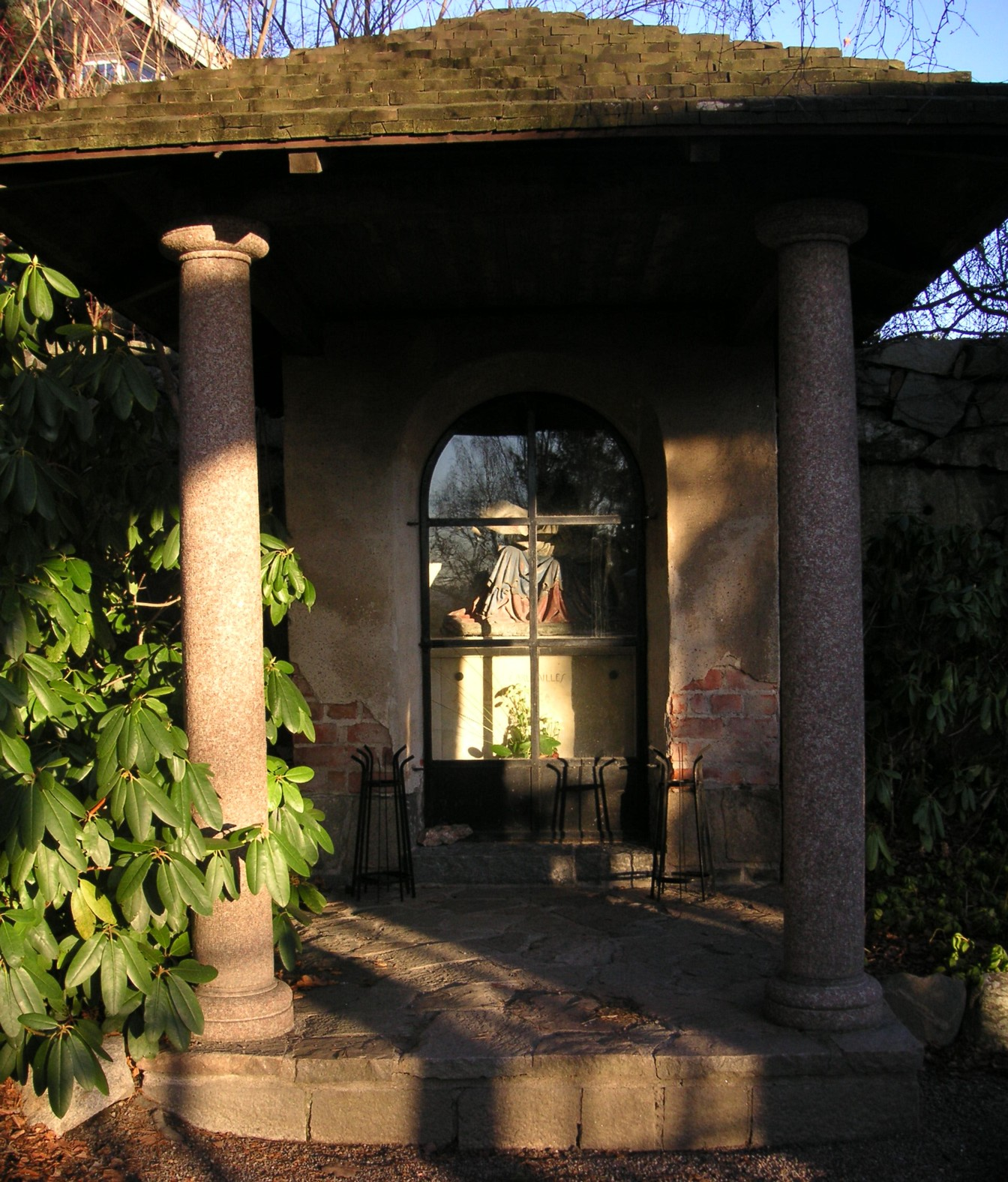 Millesgårdens garvkapell "Skogskapellet", Olga och Carl Milles gravplats